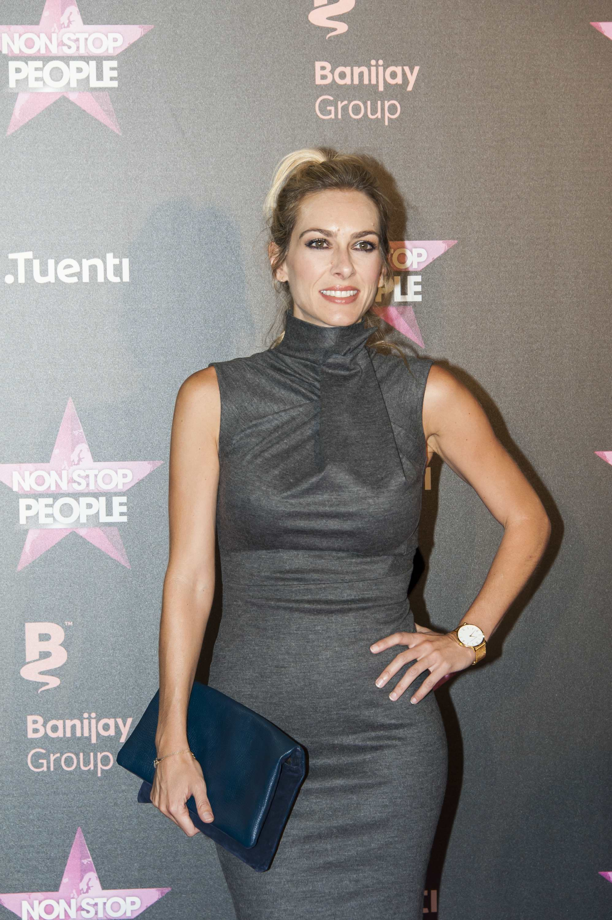 La actriz española Kira Miró.